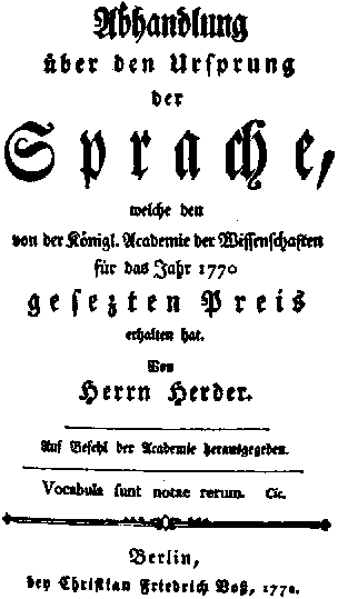 "Abhandlung über den Ursprung der Sprache", 1772, by the german writer Johann Gottfried von Herder, 1744–1803 Transcript Abhandlung über den Urſprung der Sprache welche den von der Königl. Academie der Wiſſenſchaften für das Jahr 1770 geſetzten Preis erhalten hat. Von Herrn Herder. Auf Befehl der Academie herauſgegeben Vocabula ſunt notae rerum. Cic. Berlin, bey Chriſtian Friedrich Voß, 1770